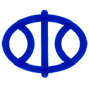 中文（中国大陆）: 广东水院旧校徽2